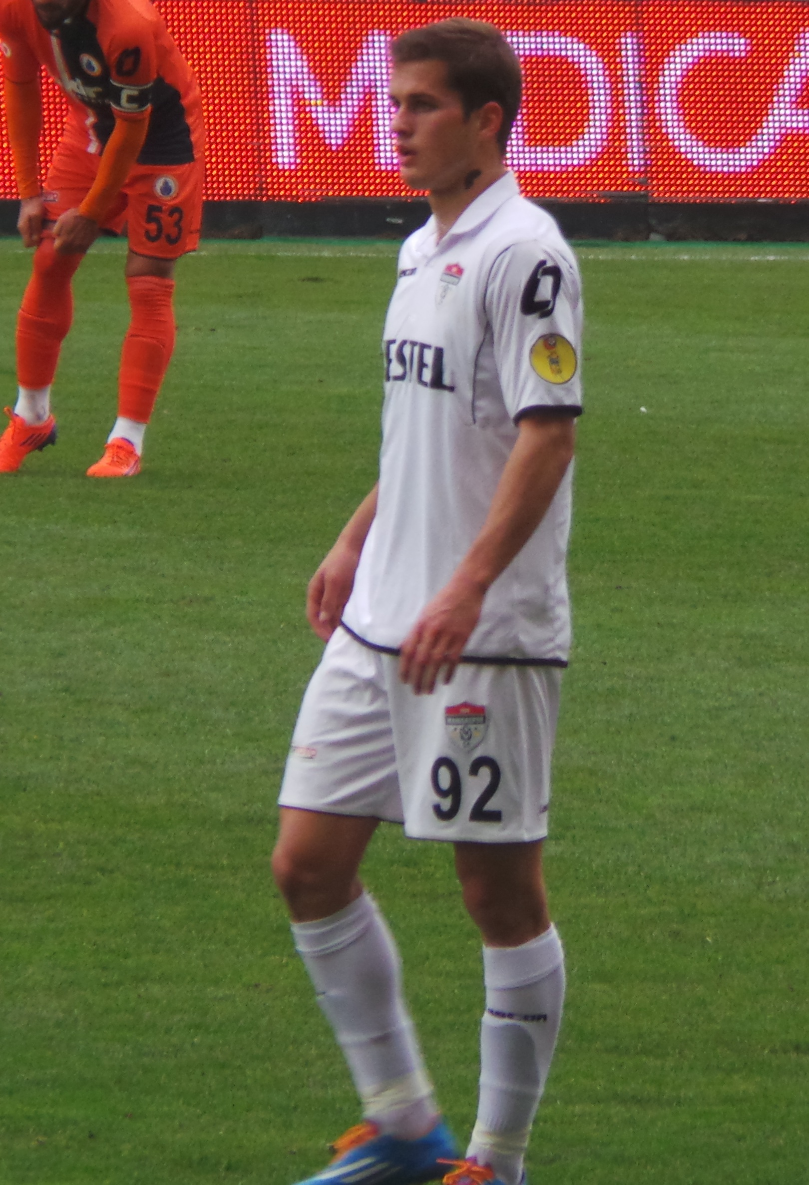 Goran Čaušić